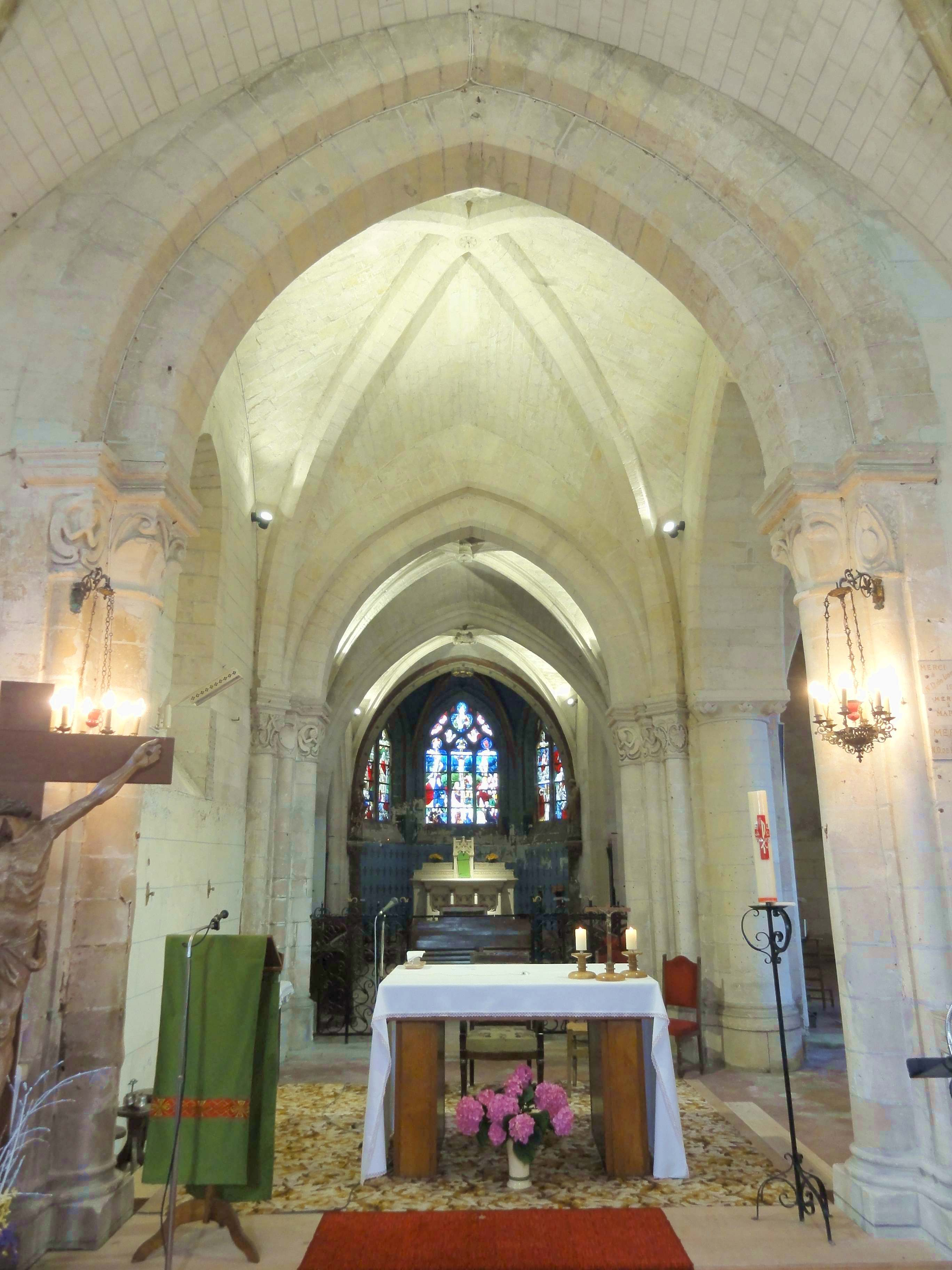 Intérieur de l'église (voir titre).